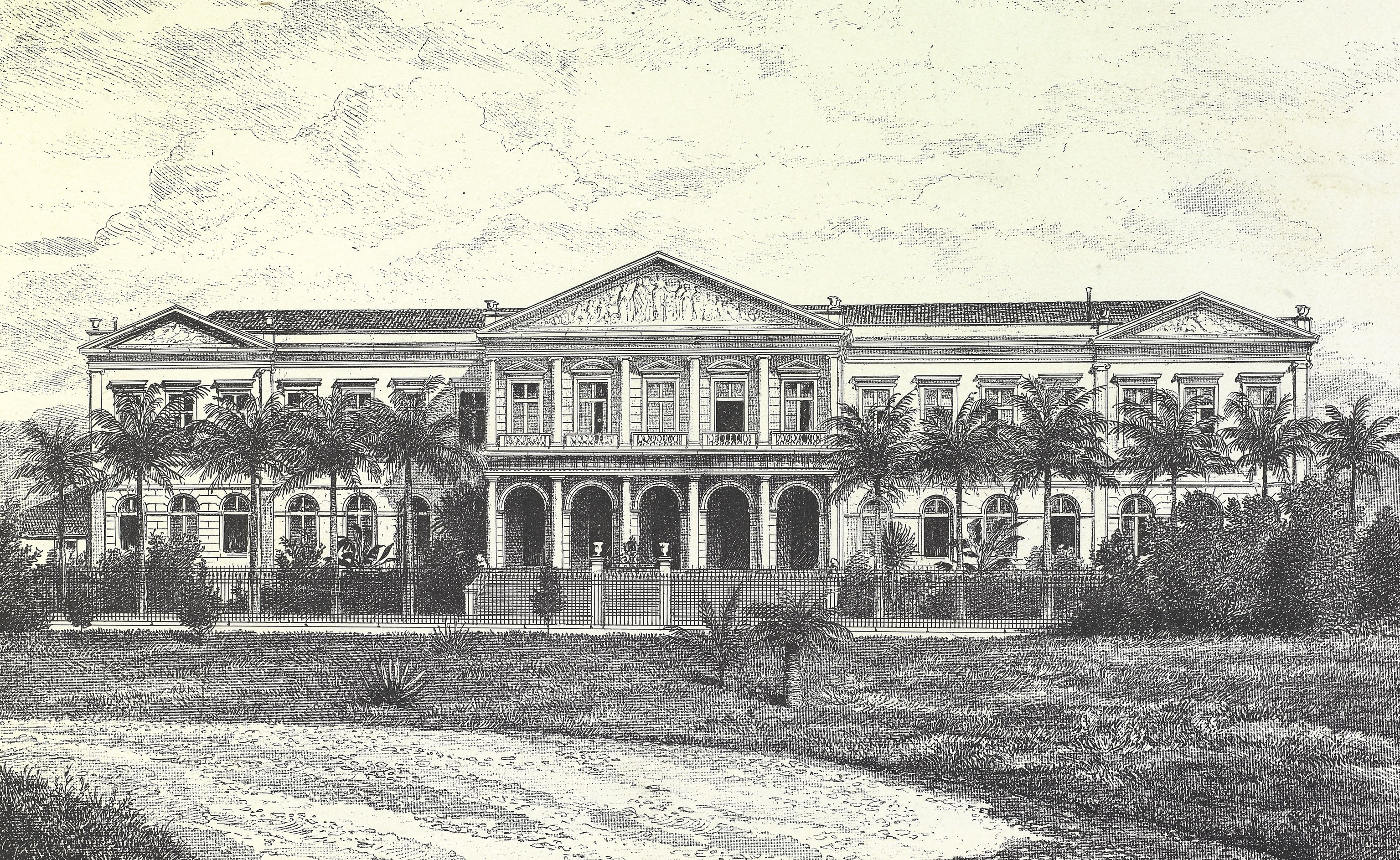 Fachada do prédio onde hoje funciona o Arquivo Nacional do Brasil. Projetado pelo arquiteto Teodoro Antônio de Oliveira em 1858 e concluído em 1868, o prédio foi a sede da Casa da Moeda do Brasil por mais de um século. Obra rara integrante do acervo bibliográfico do Arquivo Nacional, Biblioteca Maria Beatriz Nascimento.